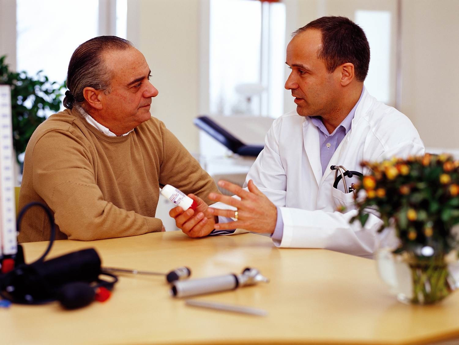 Educación al paciente